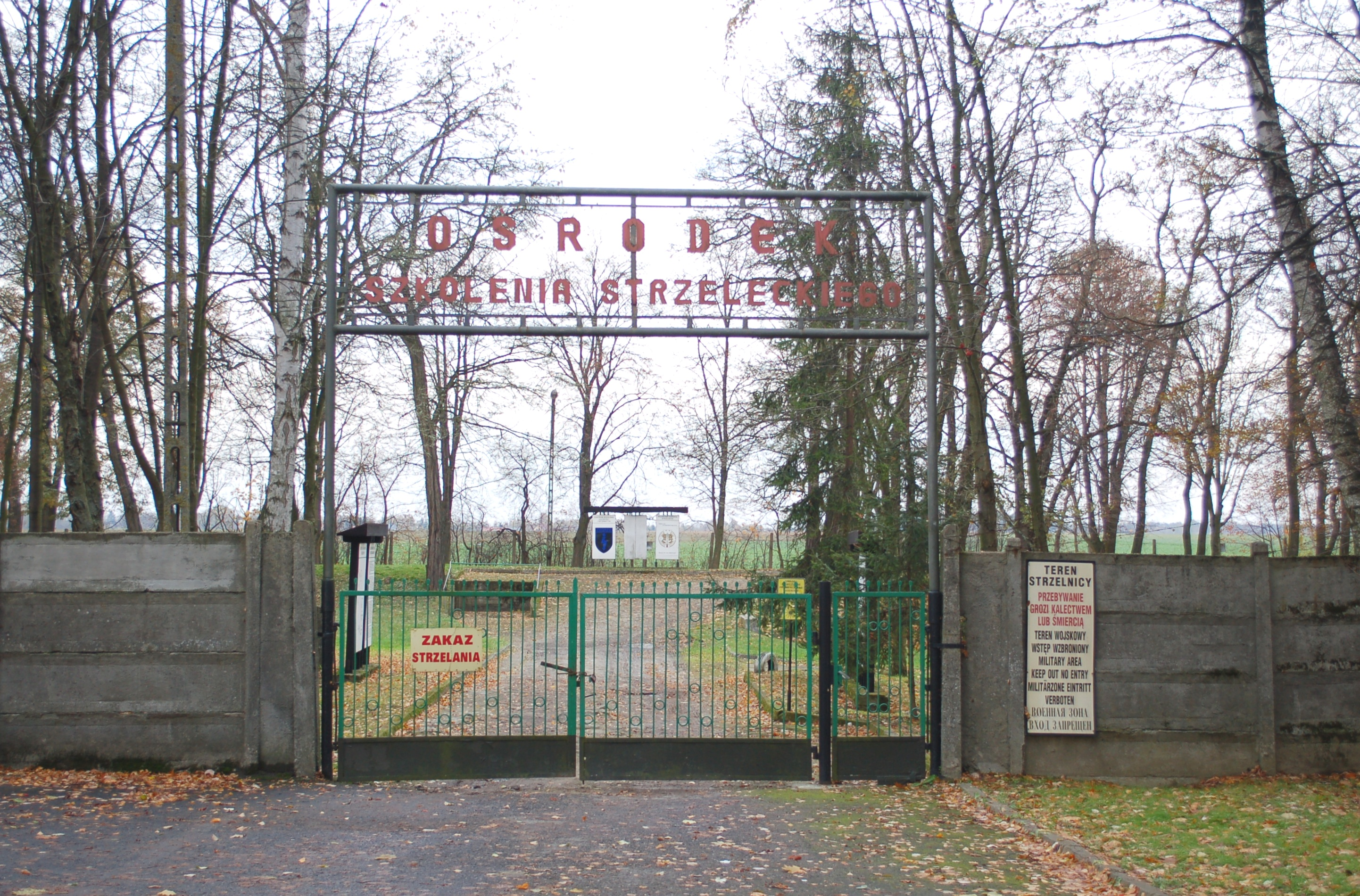 Small Fort of Zegrze Fortress